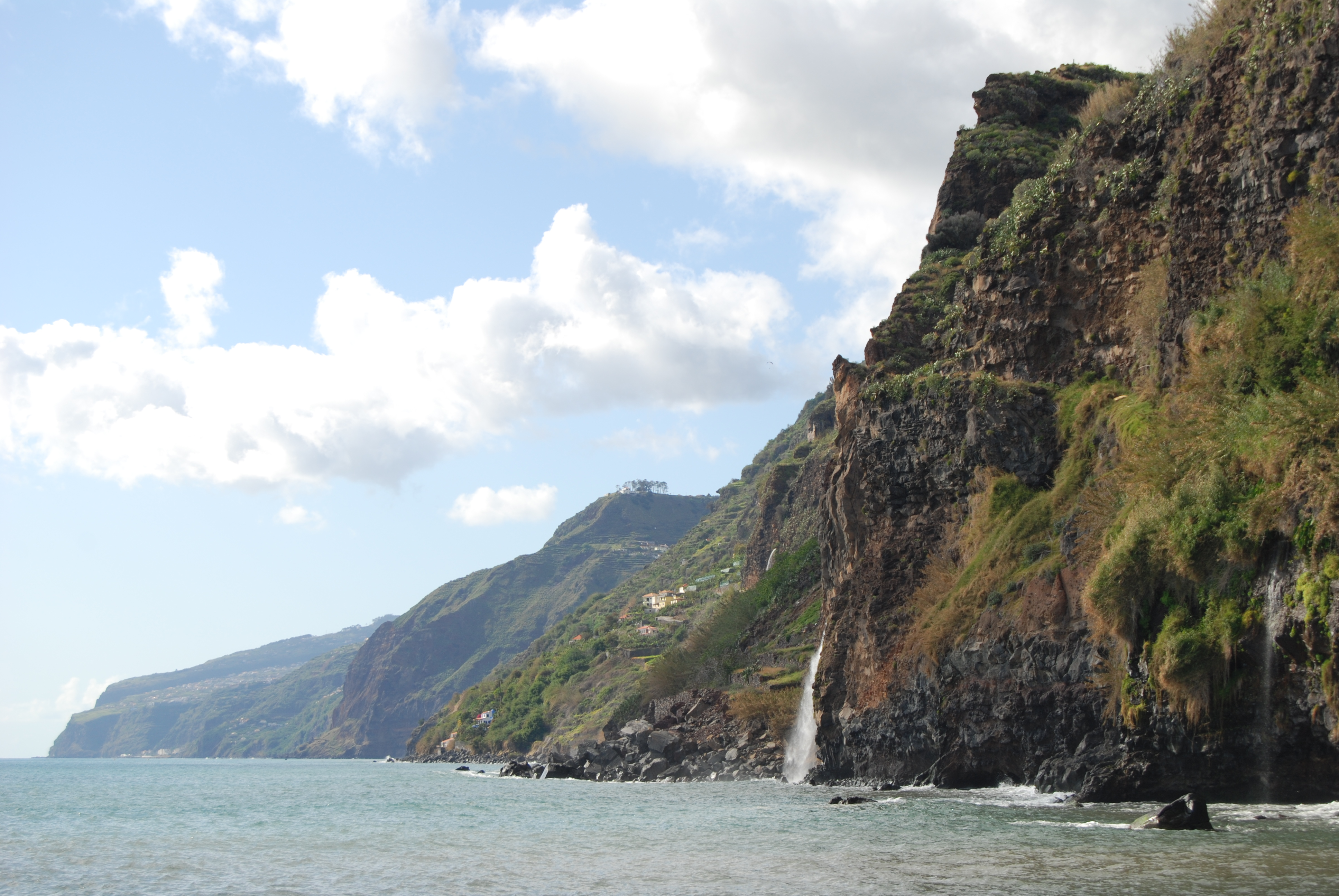 Ponta do Sol